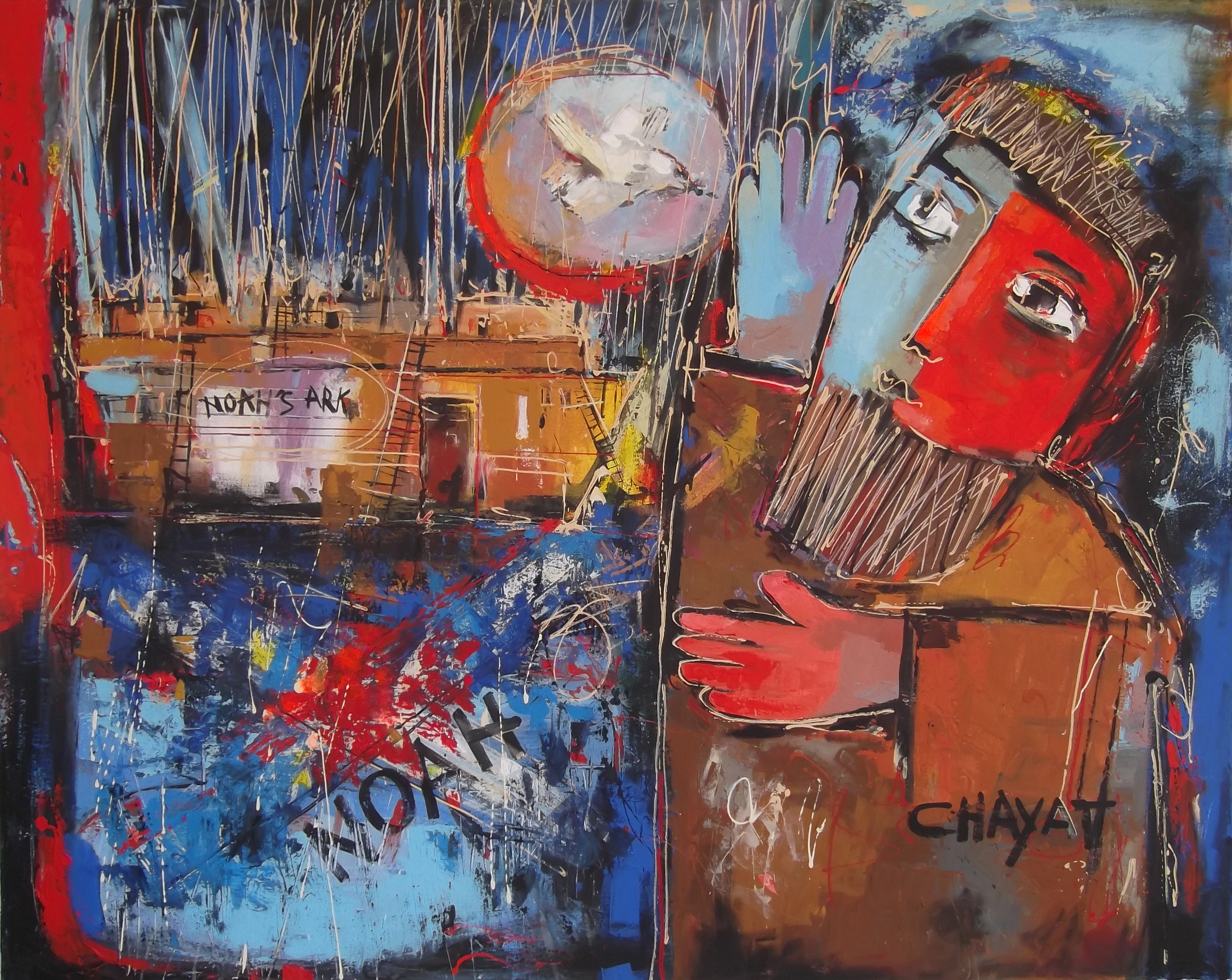 נח והתיבה, יעקב חייט